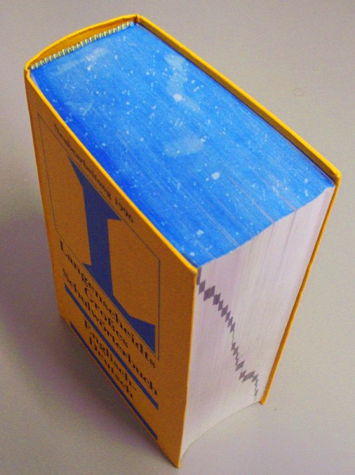 Buch mit blauem Farbschnitt und Griffleiste